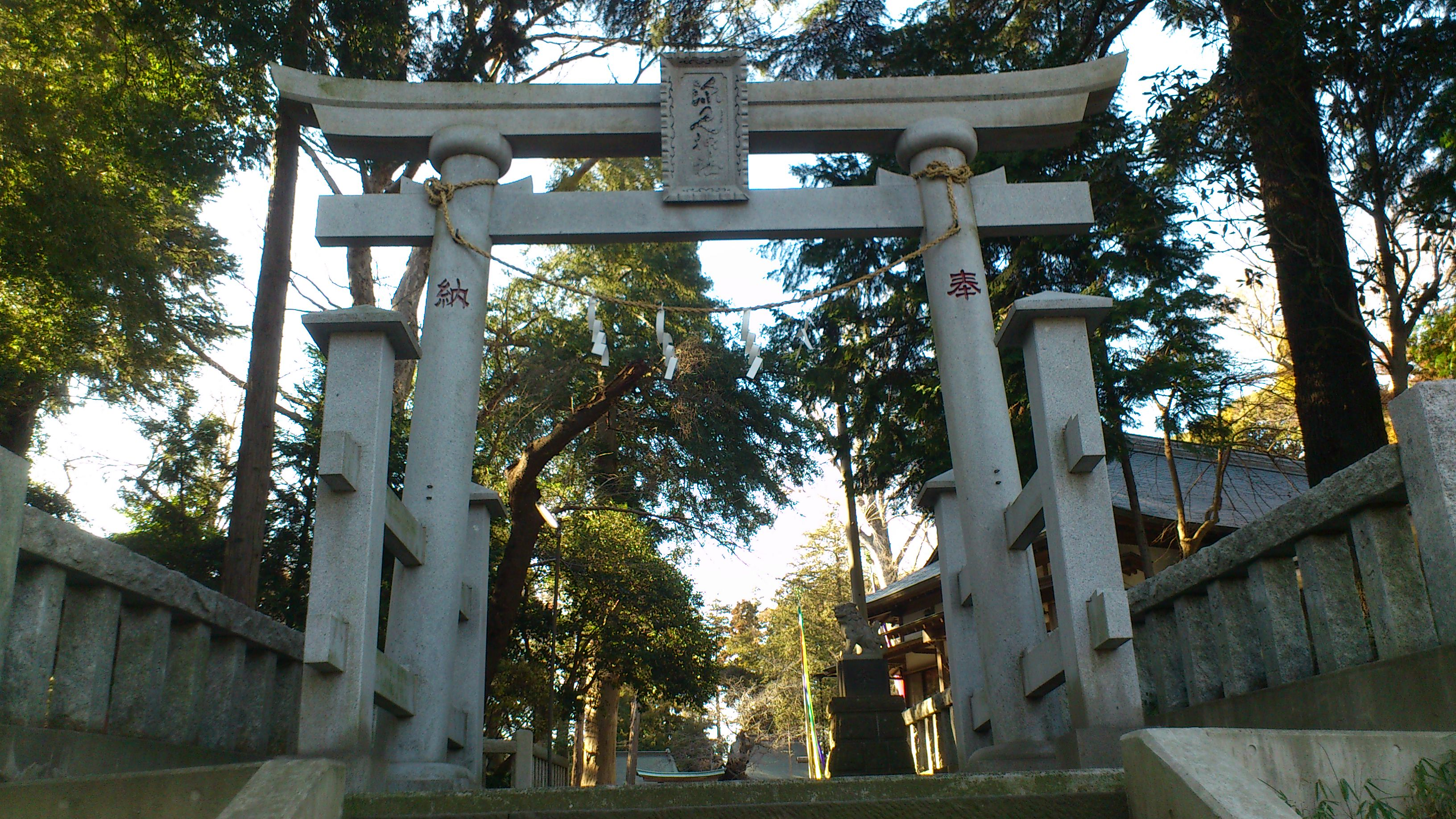 神奈川県大和市の深見神社東側の鳥居。本来の鳥居とされ、ここからまっすぐに参道が続き、御倉稲荷の辺りに東面して旧拝殿があったと思われる。